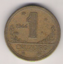 Frente da moeda de 1 Cruzeiro BRZ (1942~1967). Cunhada em 1944. This PNG graphic was created with GIMP.